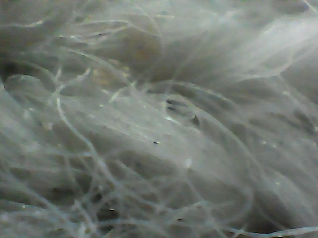 Imagen ampliada de lana blanca